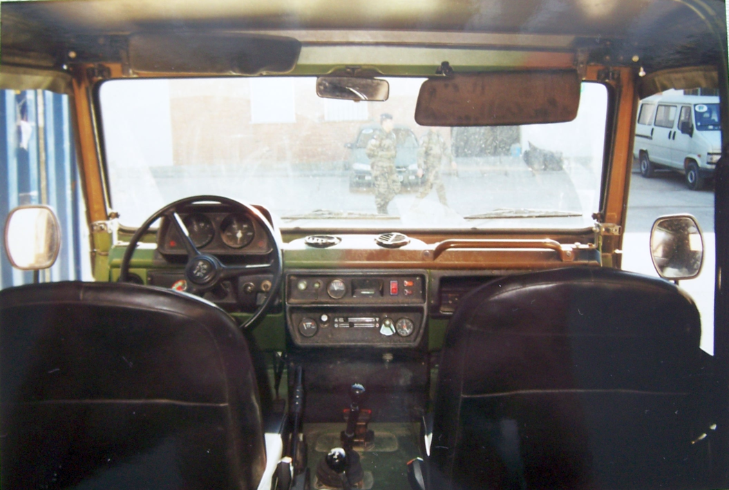 Peugeot P4 Innenraum